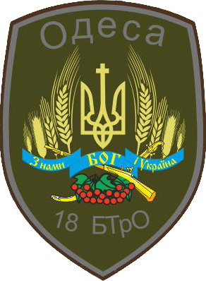 Емблема 18-го батальйону ТрО ЗСУ «Одеса» Одеської області.